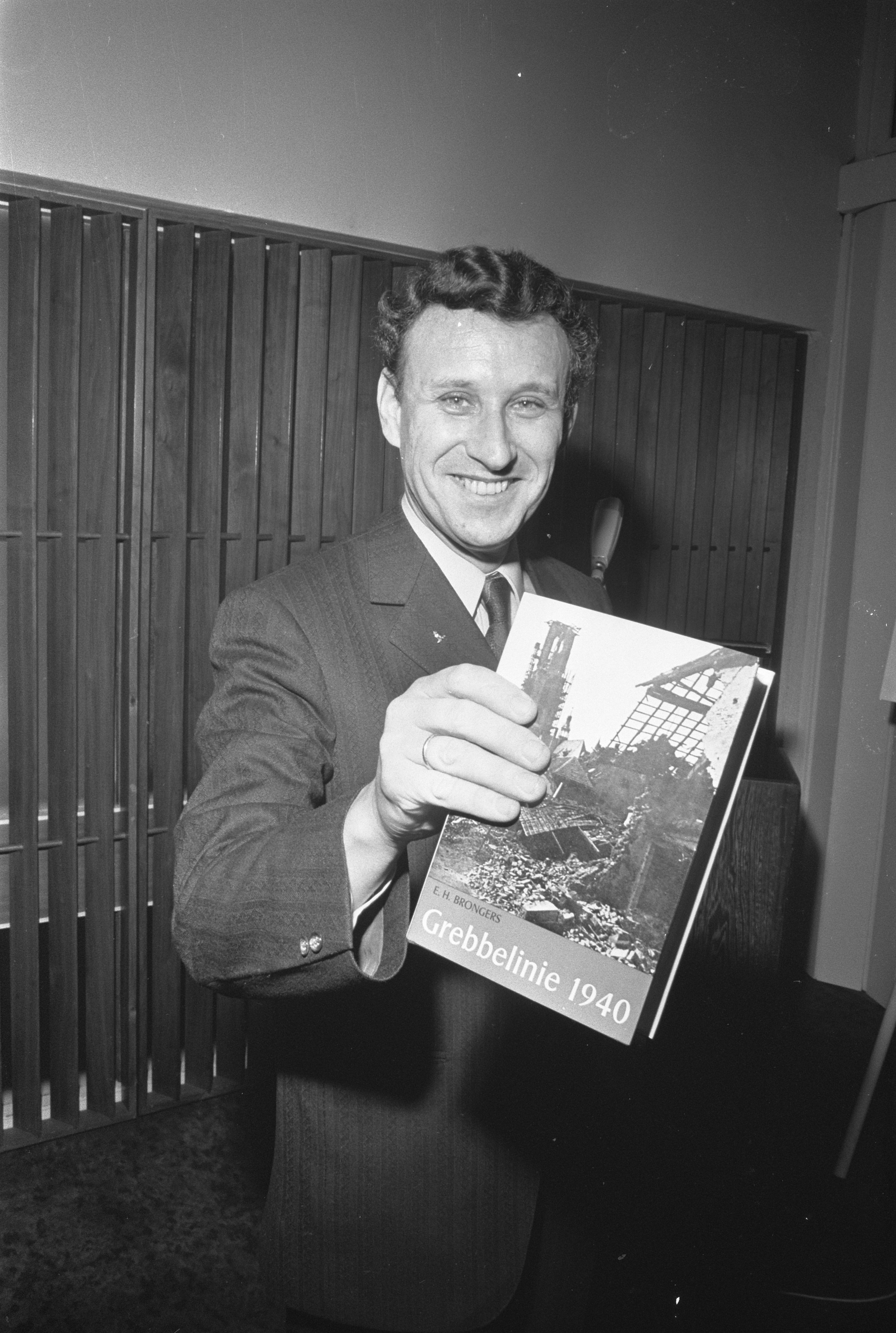 Collectie / Archief : Fotocollectie Anefo Reportage / Serie : [ onbekend ] Beschrijving : Uitgeverij Hollandia, introduceert boek "Grebbelinie 1940 Amsterdam, auteur E. H. Brongers met boek. Datum : 4 november 1971 Locatie : Amsterdam, Noord-Holland Trefwoorden : boeken, schrijvers Persoonsnaam : E. H. Brongers, HOLLANDIA Fotograaf : Mieremet, Rob / Anefo Auteursrechthebbende : Nationaal Archief Materiaalsoort : Negatief (zwart/wit) Nummer archiefinventaris : bekijk toegang 2.24.01.05 Bestanddeelnummer : 925-1075